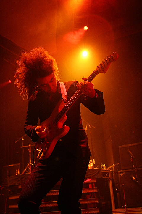 Strokes4